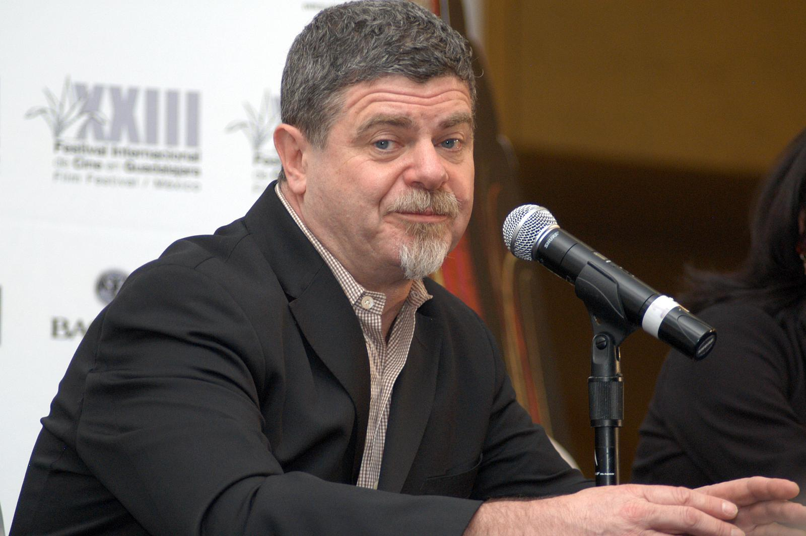 Guadalajara, Jalisco, 7 de marzo de 2008. El músico y productor Argentino Gustavo Santaolalla durante la rueda de prensa previa a su homenaje.